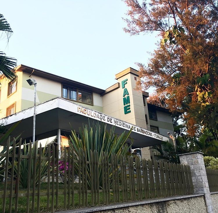 Fachada da Faculdade de Medicina de Barbacena, localizada no bairro São Sebastião.